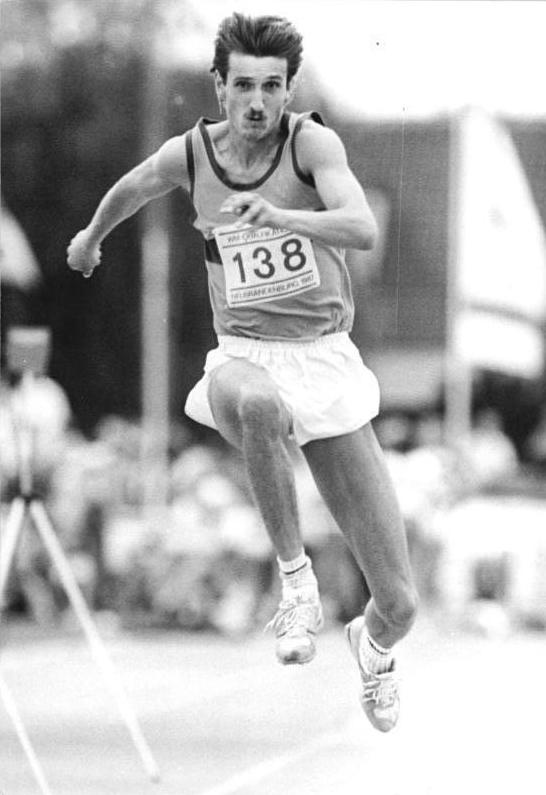 Volker Mai ADN-ZB Oberst 11.6.87 Neubrandenburg: WM-Qualifikaton der DDR-Leichtathleten. Am zweiten Tag der Weltmeisterschafts-Qualifikation der Leichtathleten in Neubrandenburg gehörten die 17,24 m des einheimischen Volker Mai im Dreisprung zu den besten Ergebnissen.